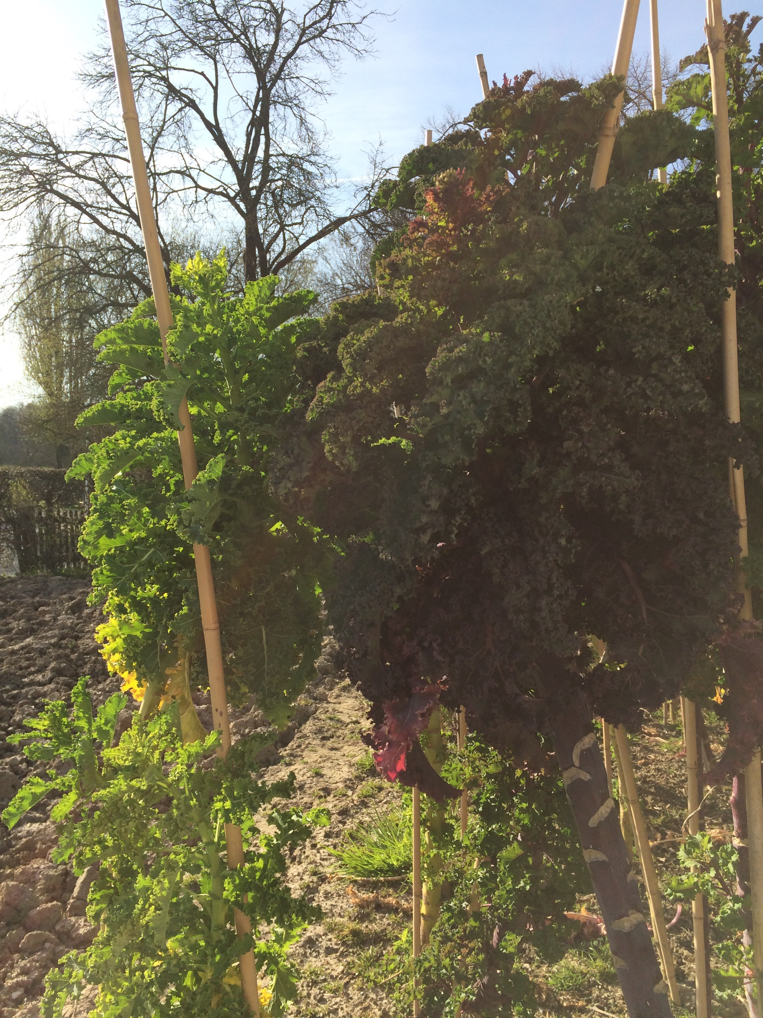 Brassica oleracea var. sabellica